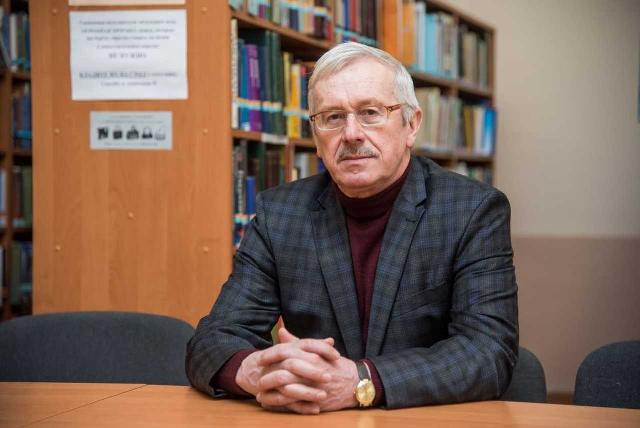 Профессор Лемещенко Пётр Сергеевич в Белорусском государственном университете.